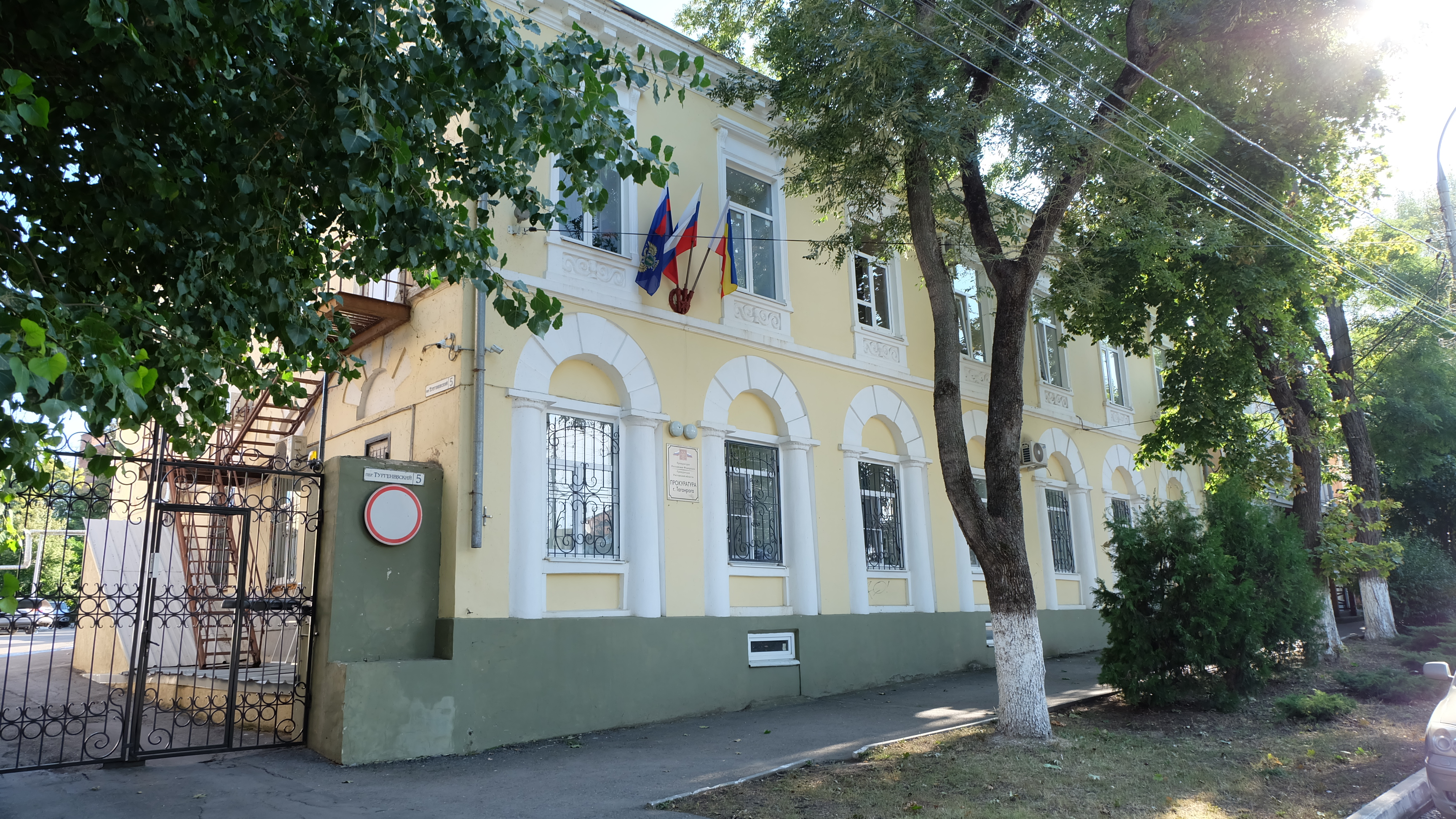 Жилой дом: переулок Тургеневский, 5, Таганрог, Ростовская область